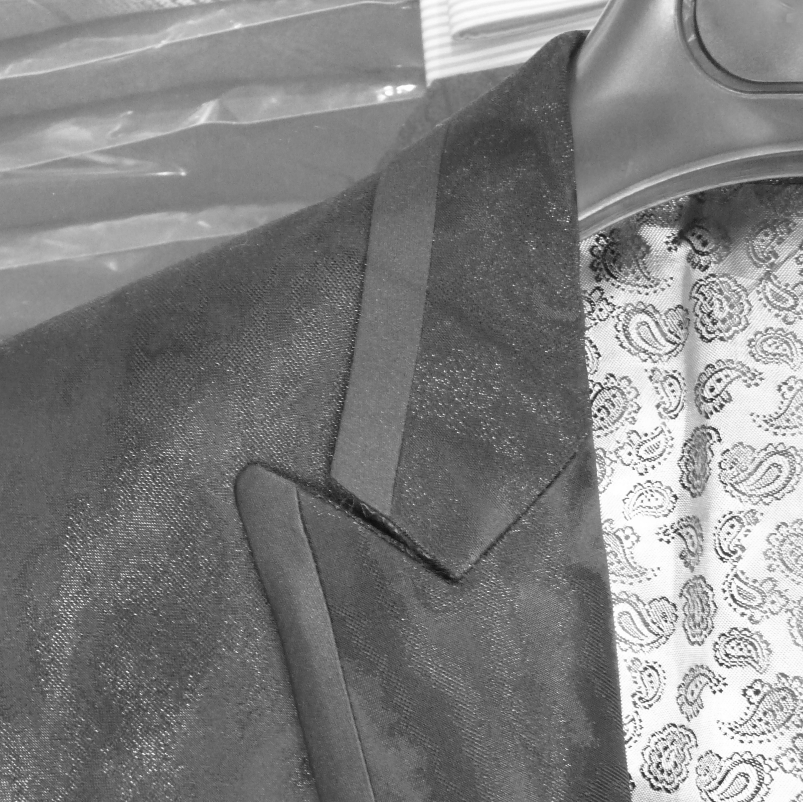 Trottoir (Randstreifen) an einem Jackett